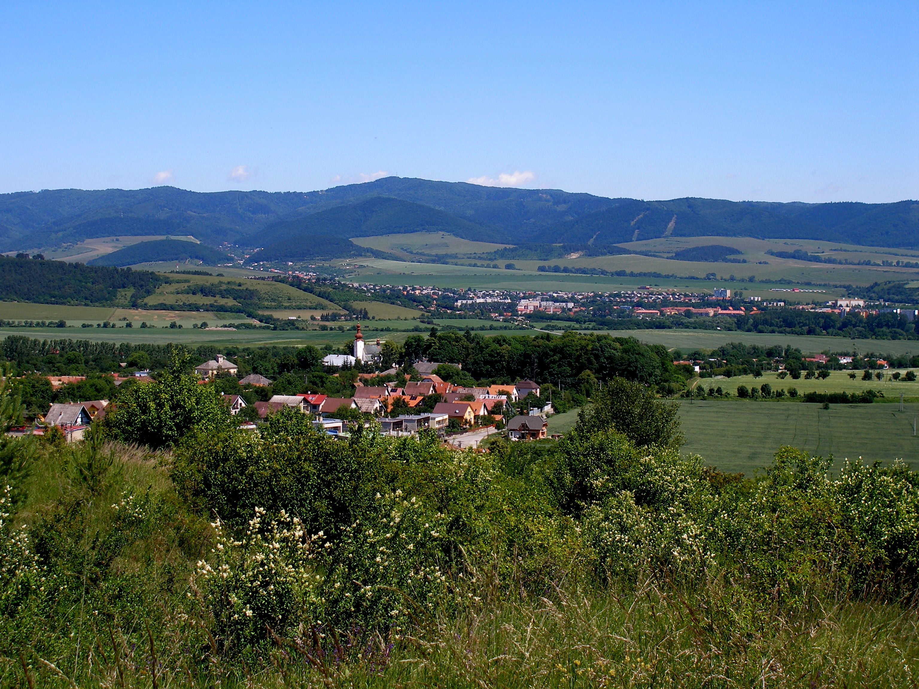 Obec Ražňany okres Sabinov